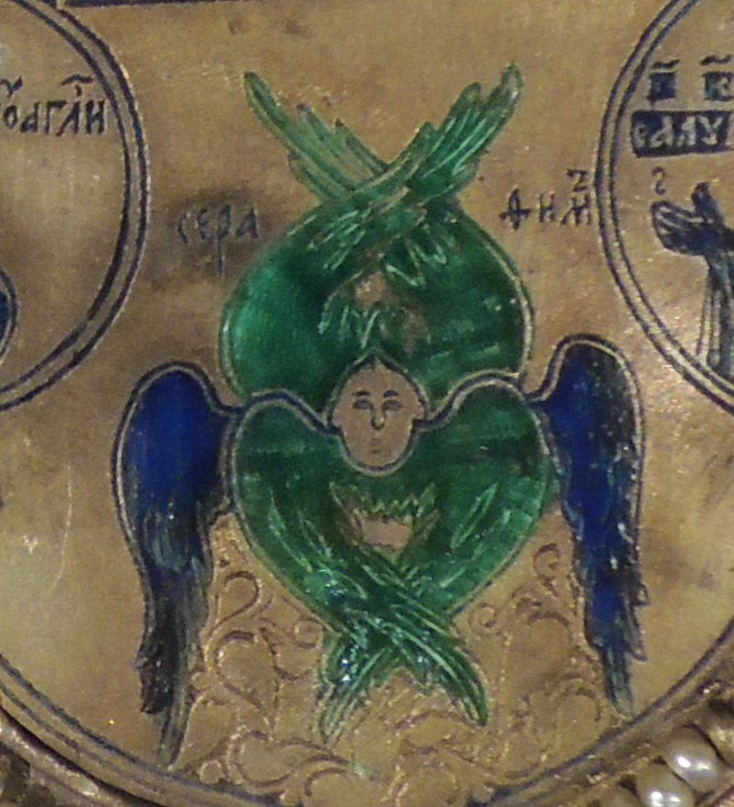 По указанию Ивана Грозного в 1551 году в Новгороде Евангелие было отреставрировано, и для него был создан новый драгоценный оклад. На серебряную позолоченную доску положили серебряную скань, на ней финифтивые миниатюры (в том числе византийской работы X века — 13 миниатюр и XI века — 5; работы русских мастеров — 6 миниатюр XII века в том числе средник с изображением Христа Вседержителя). На скань помещено шесть крупных жемчужин, а край оклада украшен обнизью из мелкого жемчуга. При этой реставрации, по мнению Е. И. Брягина, были подновлены лики евангелистов.